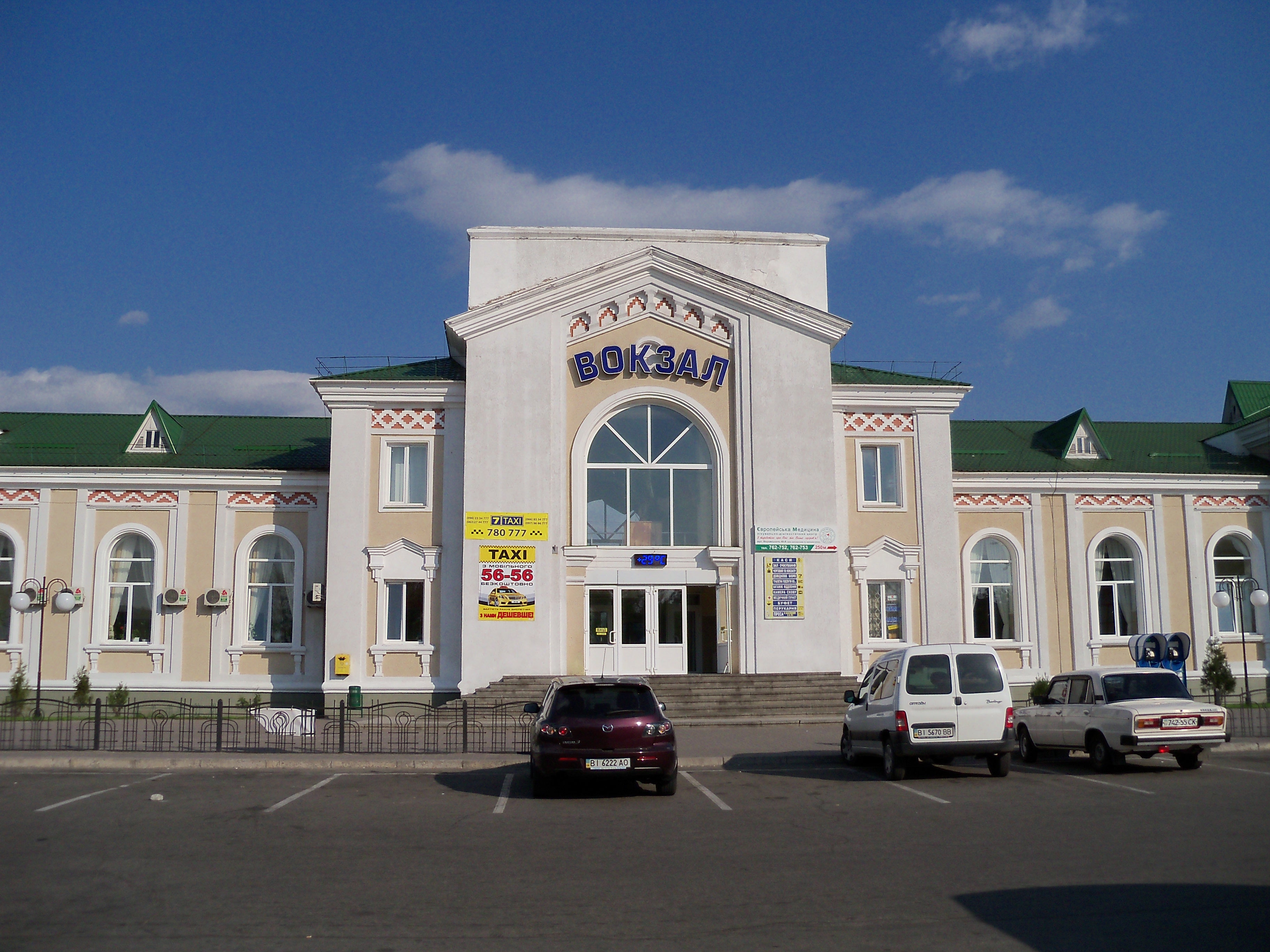 Залізничний вокзал: Залізничний вокзал (Кременчук) (30.04.11)